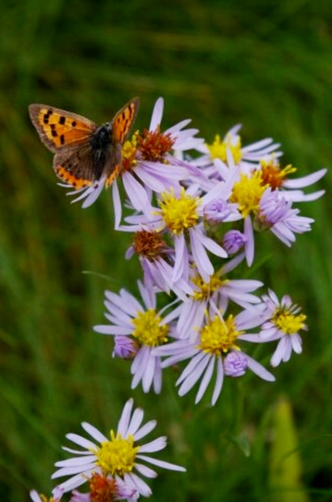 Glöyn copor bach ar flodau seren y morfa, hydref2008, Llanwnda